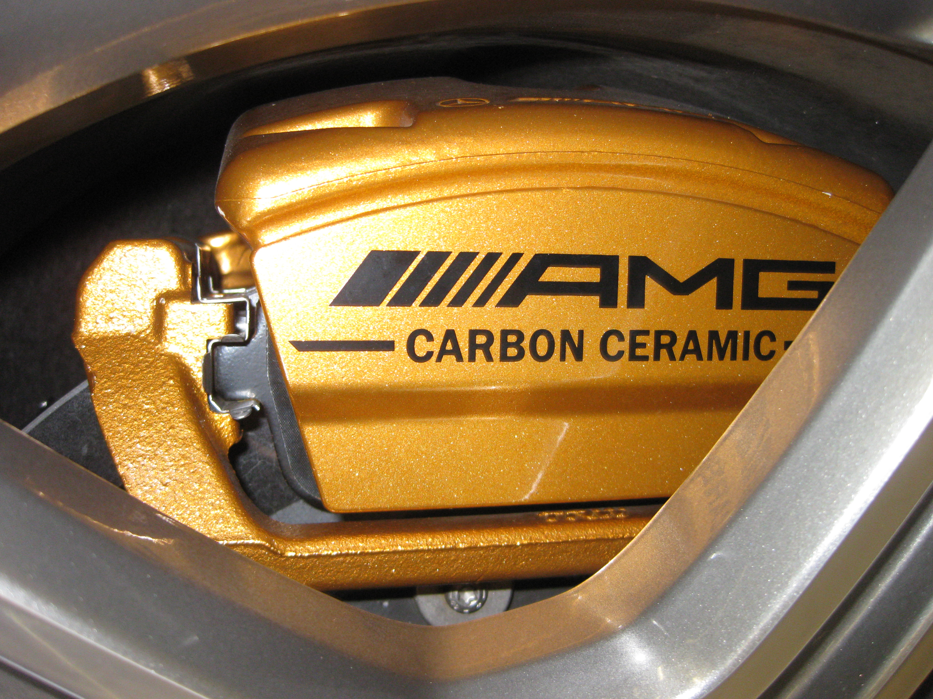 Carbon-Bremsanlage MB SL